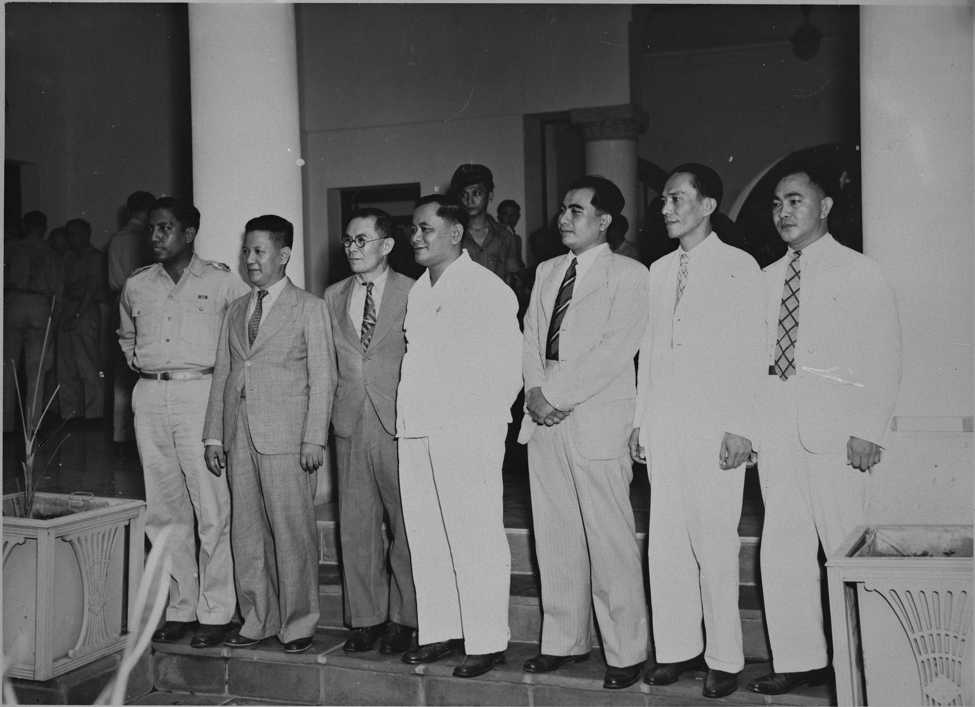 Collectie / Archief : Fotocollectie Anefo Reportage / Serie : [ onbekend ] Beschrijving : Het Constructiekabinet van Oost-Indonesië dat om 4 uur in de middag in het voormalig gebouw van de Raad van Indië te Batavia werd geïnstalleerd. Vlnr: kapitein J. Tahija, minister van Sociale Zaken; mr. Tjia Kok Tjiang, minister van Justitie; E.D. Dengah, minister van Verkeer en Waterstaat; Nadjaroeddin Daeng Malewa, minister-president en minister van Economische Zaken; Anak Agoeng Gde Agoeng, minister van Binnenlandse Zaken; Dr. S.J. Warouw, minister van Gezondheid; G.R. Pantouw, minister van Voorlichting Annotatie : Repronegatief Datum : 13 januari 1947 Locatie : Batavia, Indonesië, Jakarta, Nederlands-Indië Trefwoorden : groepsportretten, kabinetten, staten Persoonsnaam : Anak Agoeng Gde Agoeng, Dengah, E.D., Nadjaroeddin Daeng Malewa, Pantouw, G.R., Tahija, J, Tjia Kok Tjiang, Warouw, S.J. Fotograaf : NIGIS [Netherlands Indies Government Information Service] Auteursrechthebbende : Nationaal Archief Materiaalsoort : Glasnegatief Nummer archiefinventaris : bekijk toegang 2.24.01.09 Bestanddeelnummer : 902-0057